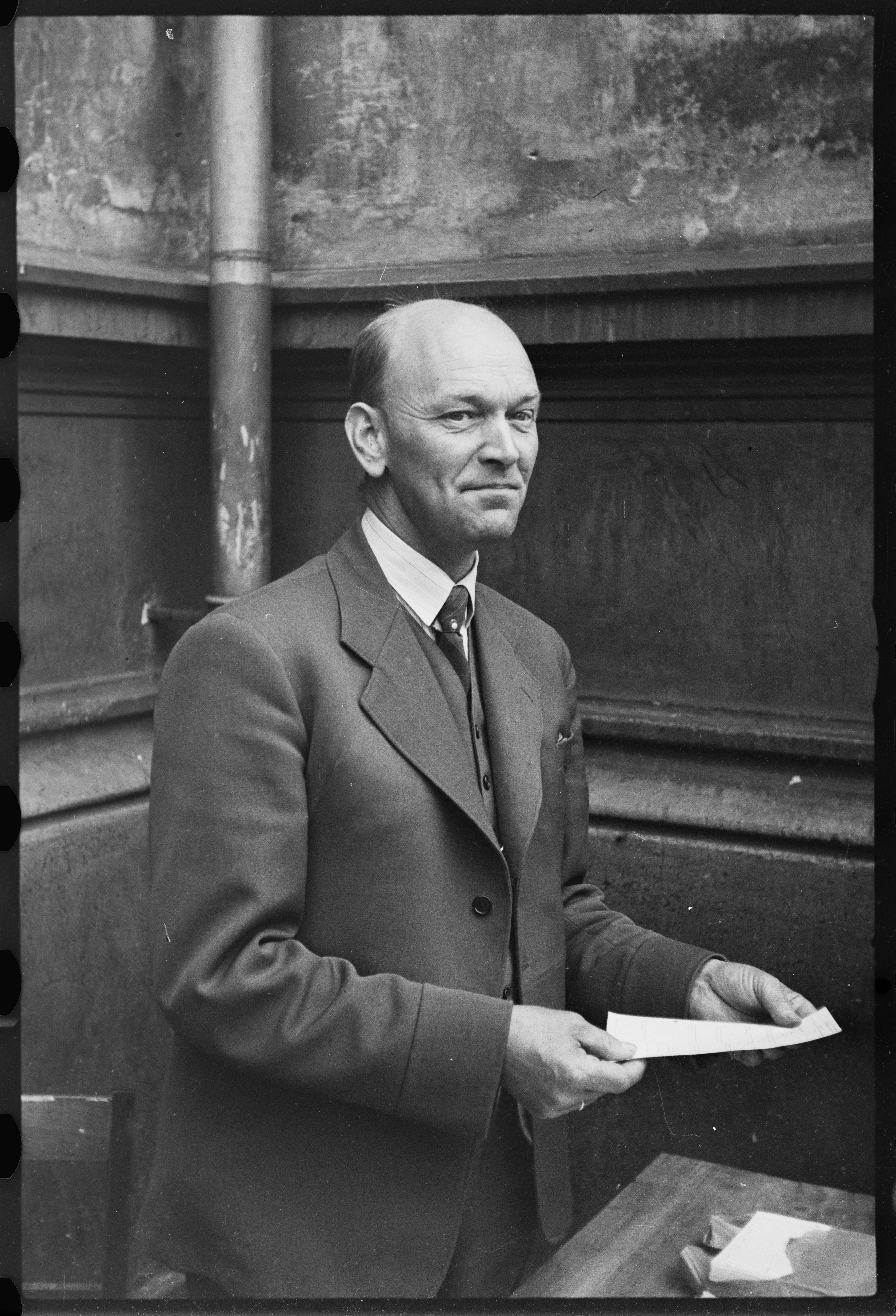 Norske legion fot. på Bjølsen skole juli 1941 (Original bildetekst) Trolig Jørgen Matheus Bakke (født 29. juli 1894 i Bamle i Telemark, død 1962?), lærer og bestyrer ved Mysen offentlige høyere allmennskole fra 1922, medlem i Nasjonal Samling 1933–1936 og 1940–1945, kaptein i hæren fra 1936 og «chefsinspektør i skolevesenet» fra november 1940. Quisling utså Bakke og major Finn H. Kjelstrup som ledere i staben for å bygge opp Den norske legion (SS-Freiwilligen-Legion Norwegen), en militær enhet som ble oppretta i Oslo i juli 1941 for å skaffe soldater til tysk side under kampene på østfronten. Bakke ble major (Leg.-Sturmbannführer) i legionens «Bataljon Viken», organisert 12.–24. juli, fra 1. august samme år. Han ble tildelt Jernkorset for sin innsats som «frontkjemper mot bolsjevismen». På grunn av en skade oppga han krigstjenesten og begynte i februar 1943 å arbeide for Organization Todt i Norge. I august dette året ble han leder for Norsk Frontføring som skulle ivareta interessene til norske arbeidere på tyske anlegg. Landssviksaken mot Bakke etter krigen foregikk i lagmannsretten i Sarpsborg.